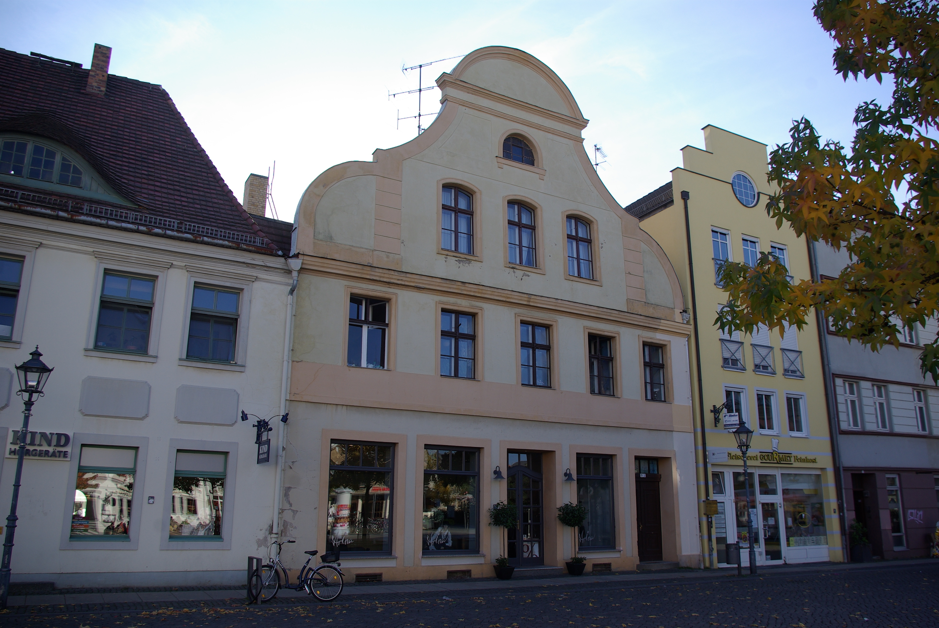 Cottbus in Brandenburg. Das Haus Altmarkt 27 steht unter Denkmalschutz.